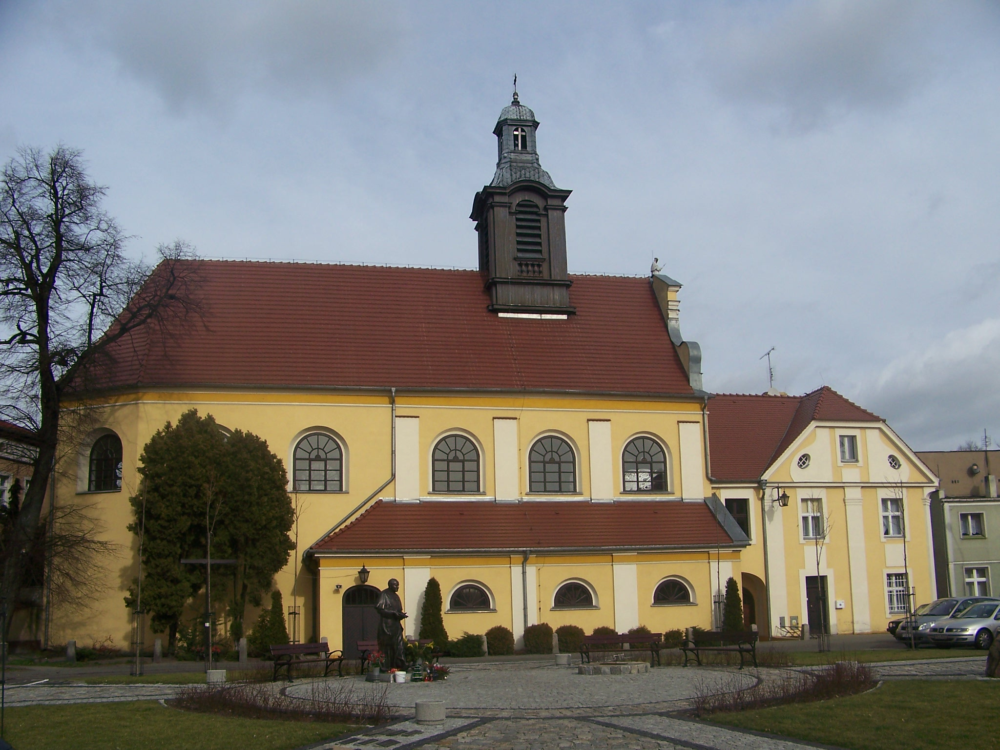 Kościół pw. Pana Jezusa w Kościanie; Church in Kościan, Poland